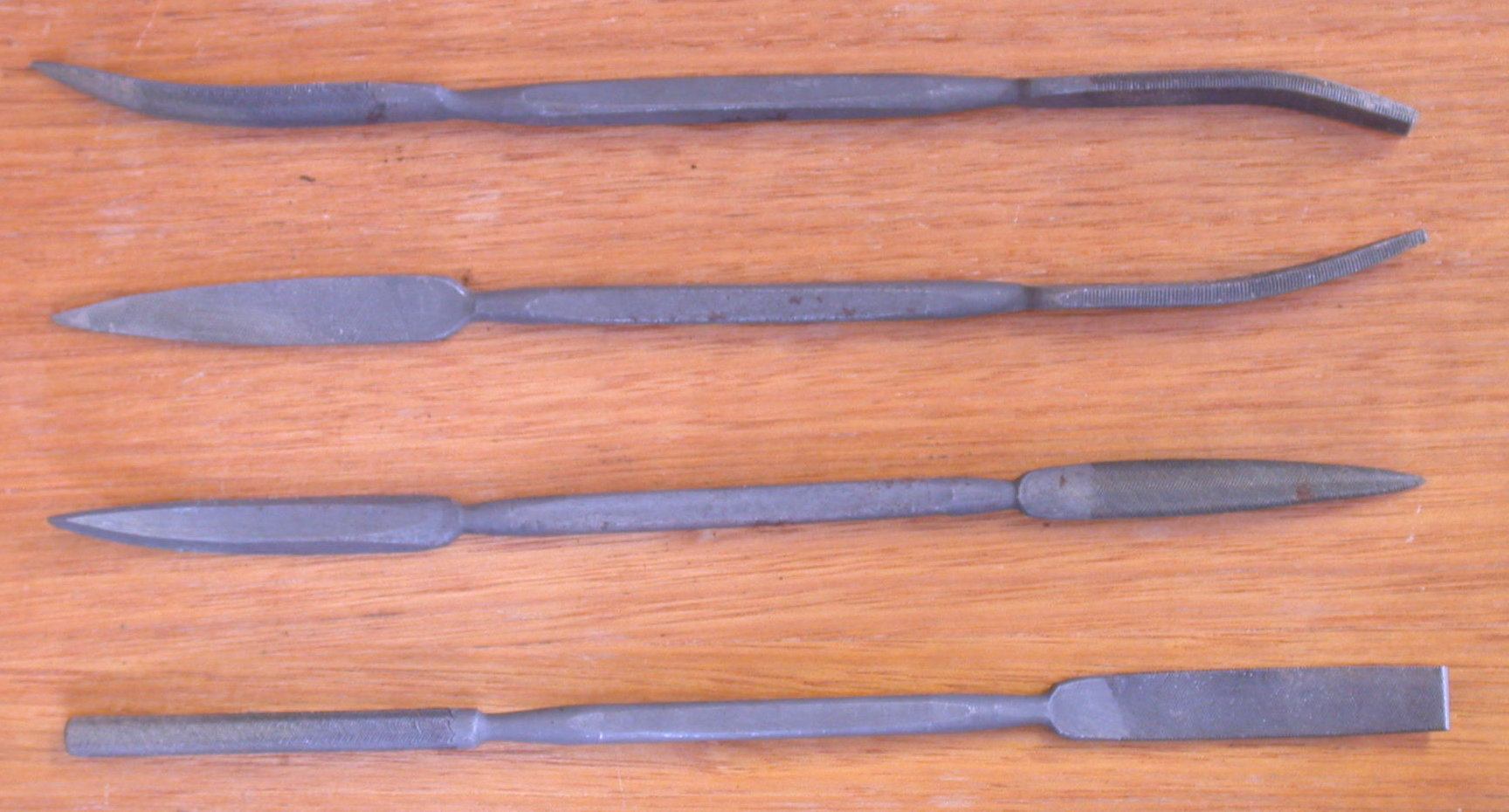 Four riffler files